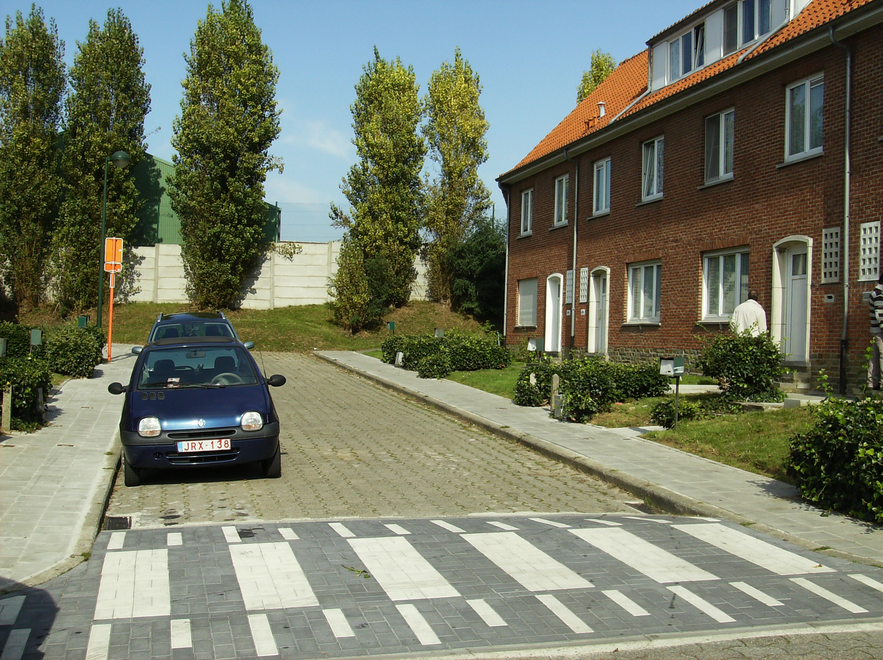 rue Jean Ekelmans Auderghem bout de la rue